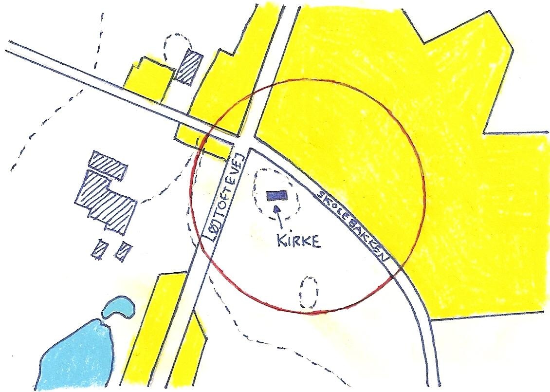 Formodet placering af Krogsbølle, nedlagt landsby ved Nakskov. (Svinglens nutidige placering)